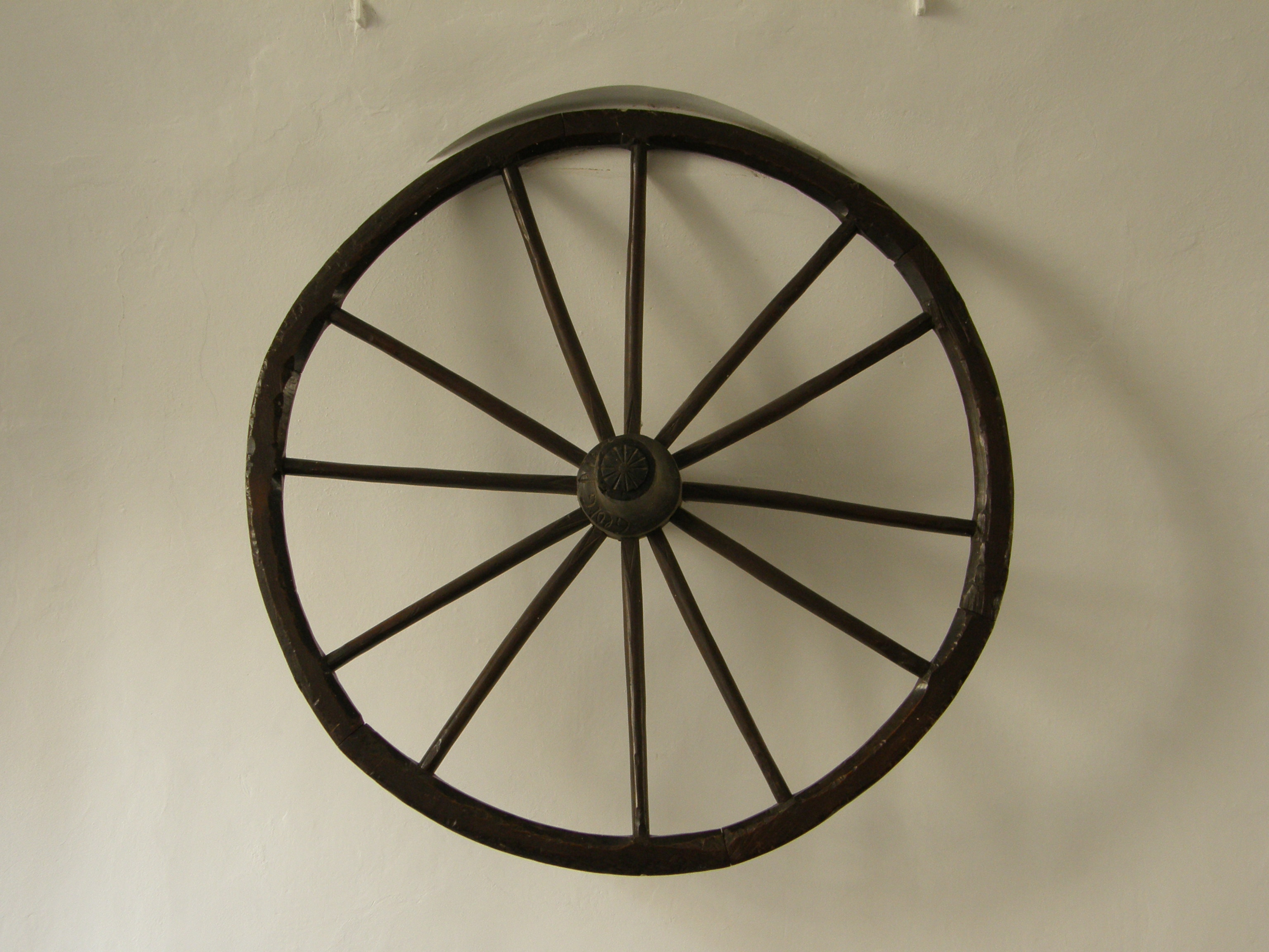 Stará radnice (Brno)